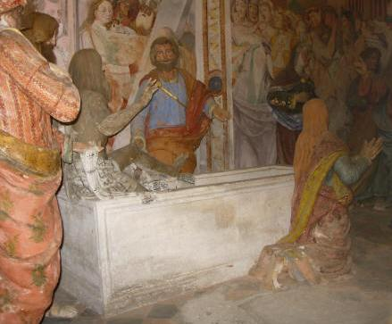 Cappella XVI del Sacro Monte di Varallo Sesia